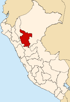 made by User:StarbucksFreak